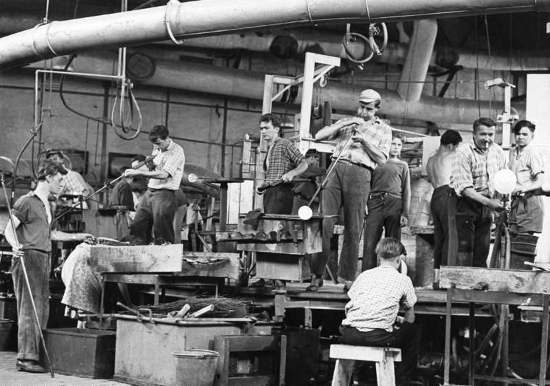 Glashüttenwerke Peill und Putzler, Düren